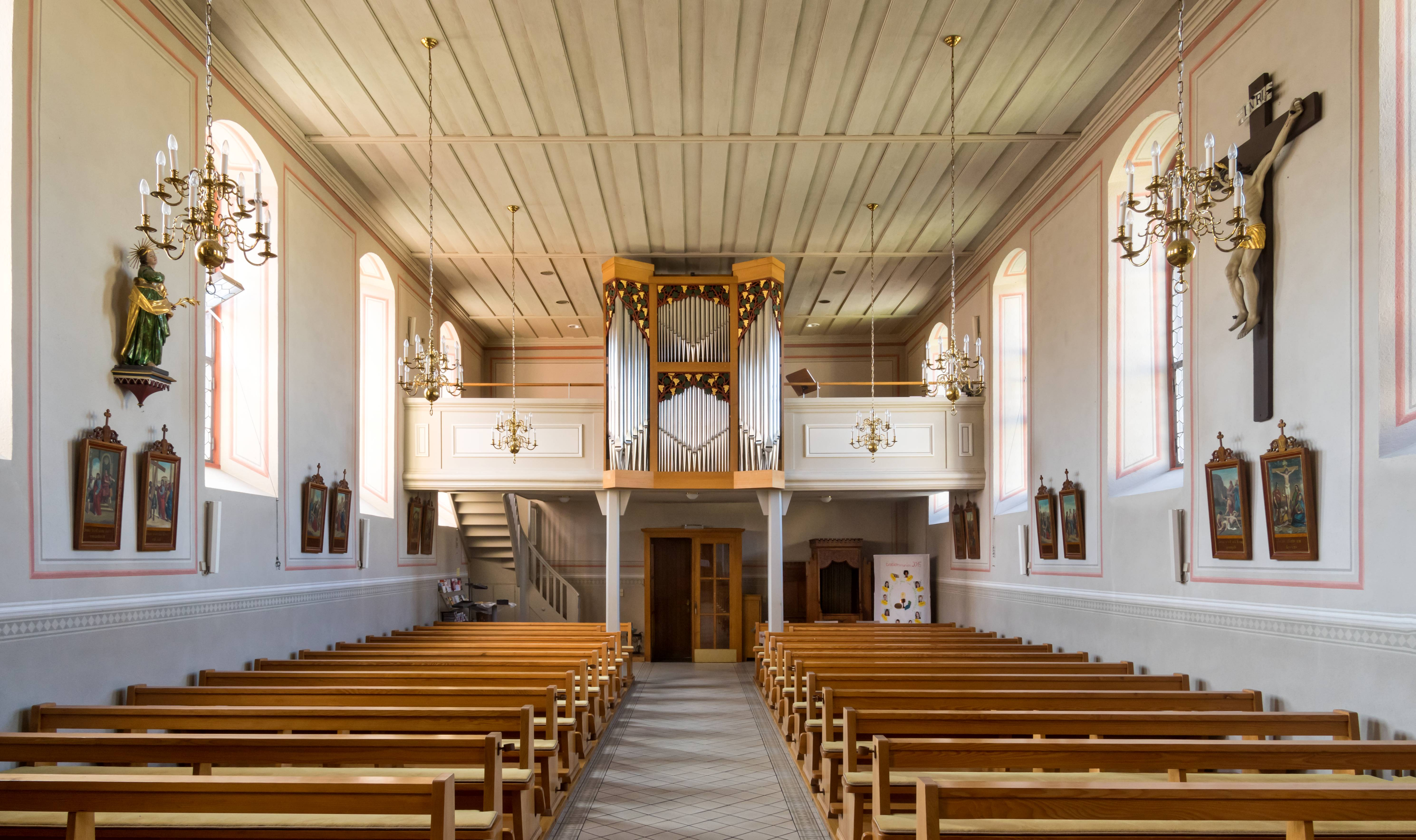 St. Agatha in Grunern, einem Teilort von Staufen Blick zum Haupteingang und neuer Orgel